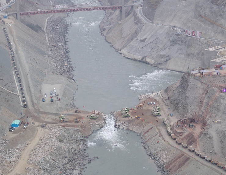 截流过程2